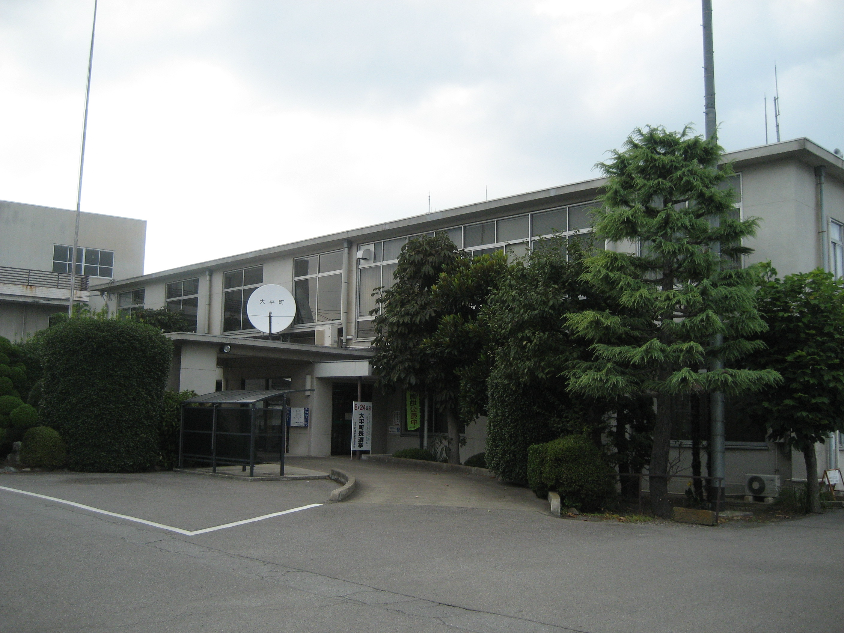 栃木県大平町役場